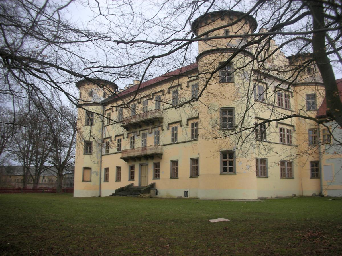 Schloss in Jindřichovice beinhaltet staatliches Archiv Státní Okresní Archiv Sokolov